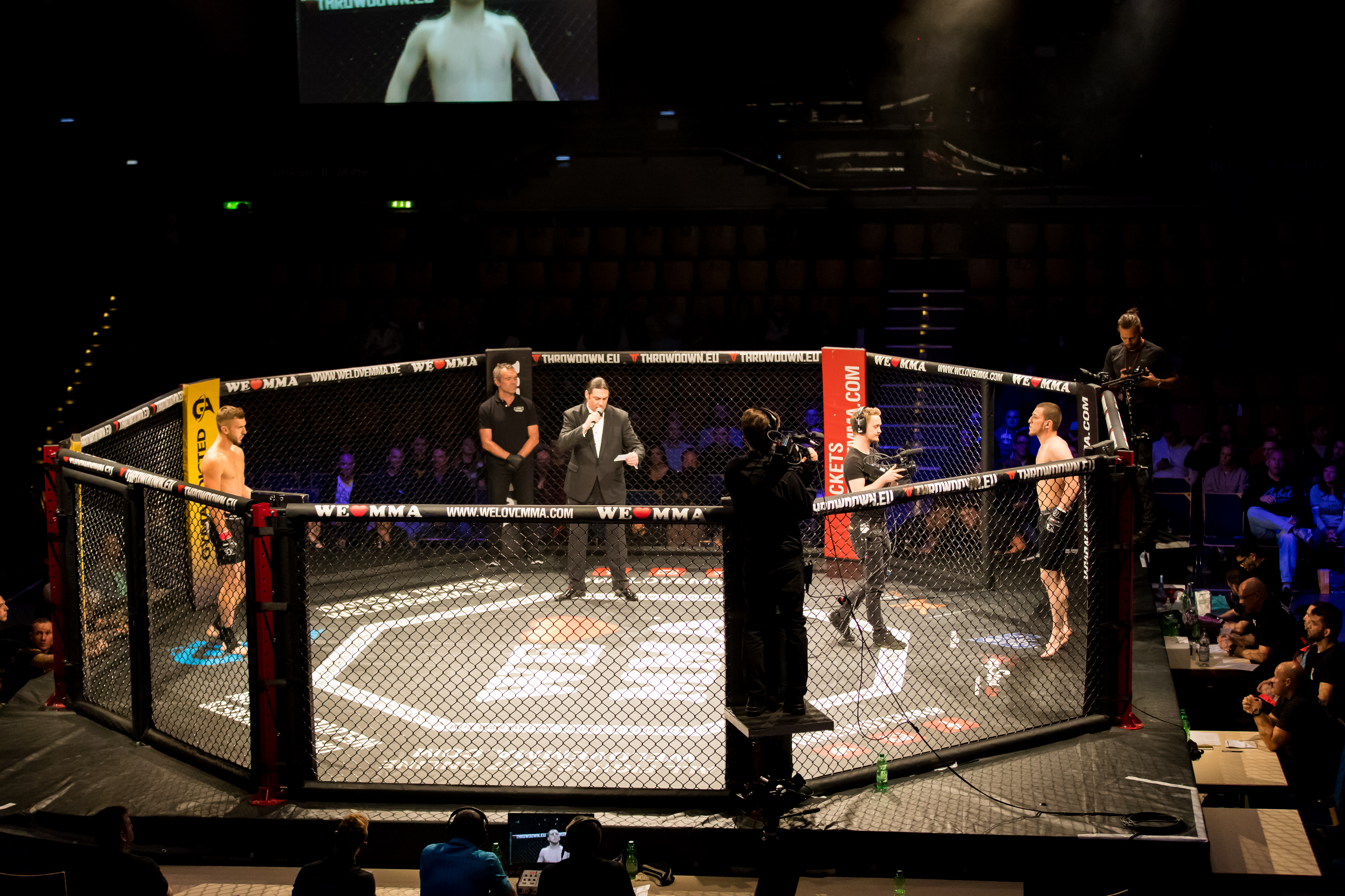 during We love MMA: Mixed Martial Arts at Friedrich-Ebert-Halle, Ludwigshafen, Rheinland-Pfalz, Germany on 2017-04-22, Photo: Sven Mandel